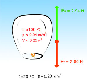 Иллюстрация принципа работы китайских летающих фонариков, для статьи о китайских фонариках.